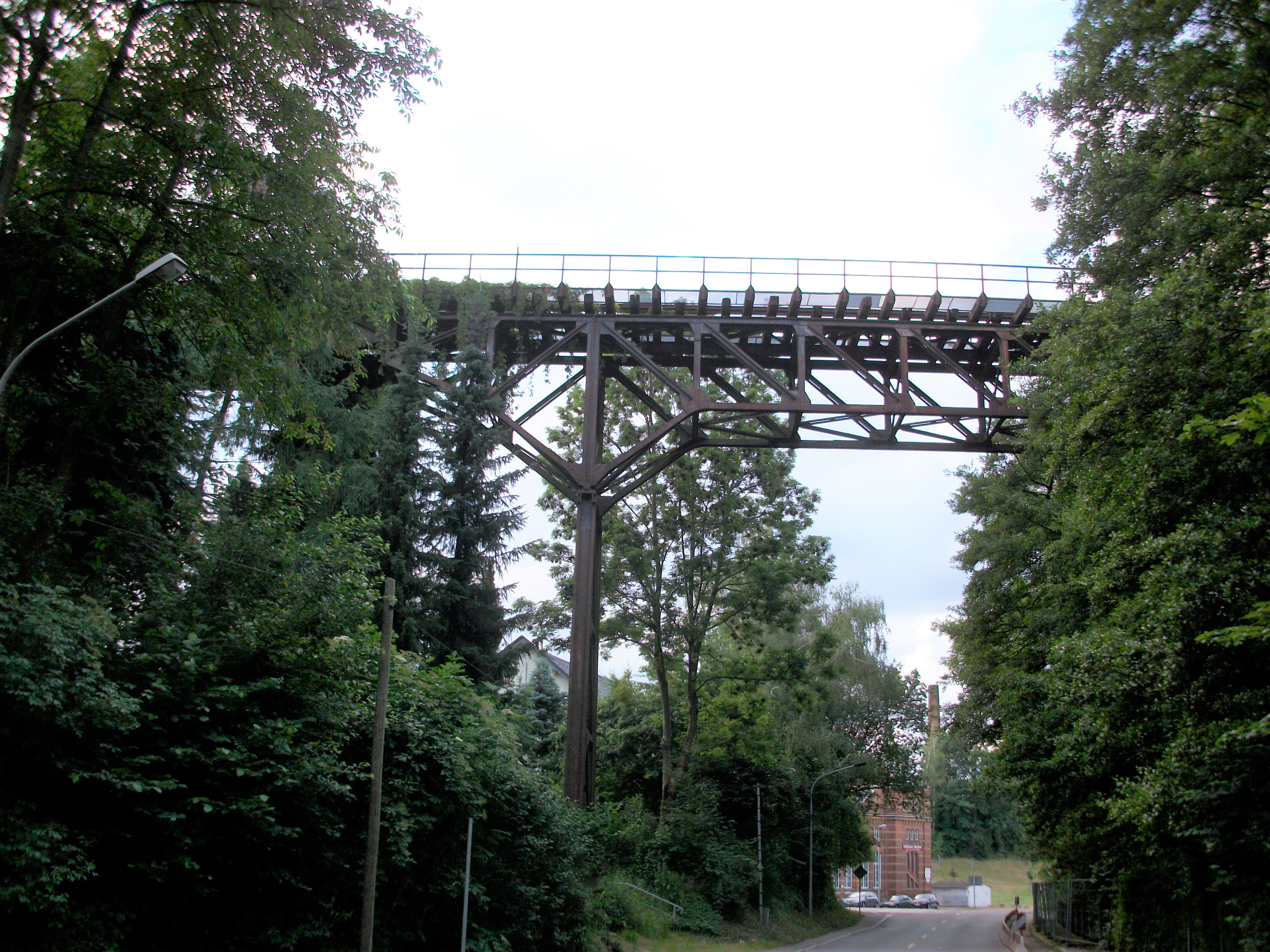 Viadukt Mittweida (2018)